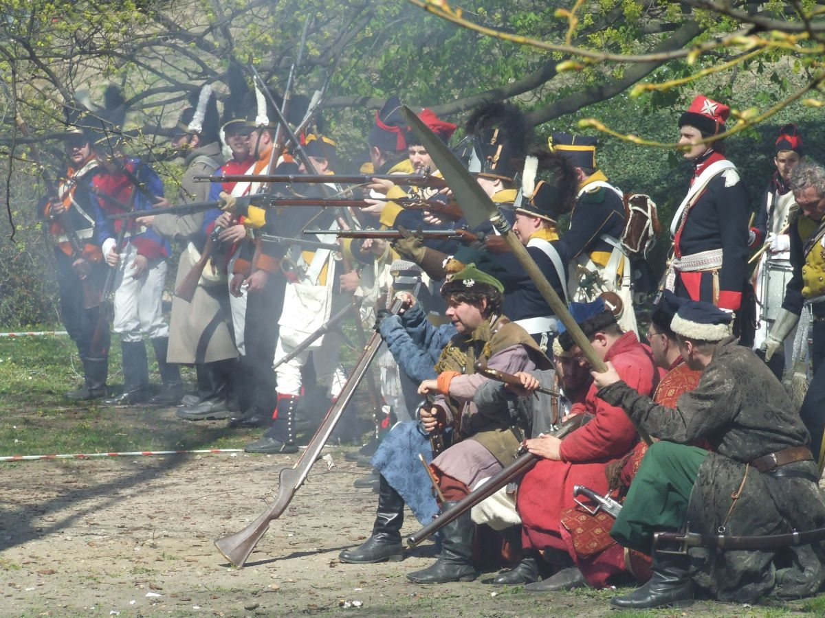 Inscenizacja Insurekcji Warszawskiej w Ogrodzie Saskim w Warszawie, 14.04.2007